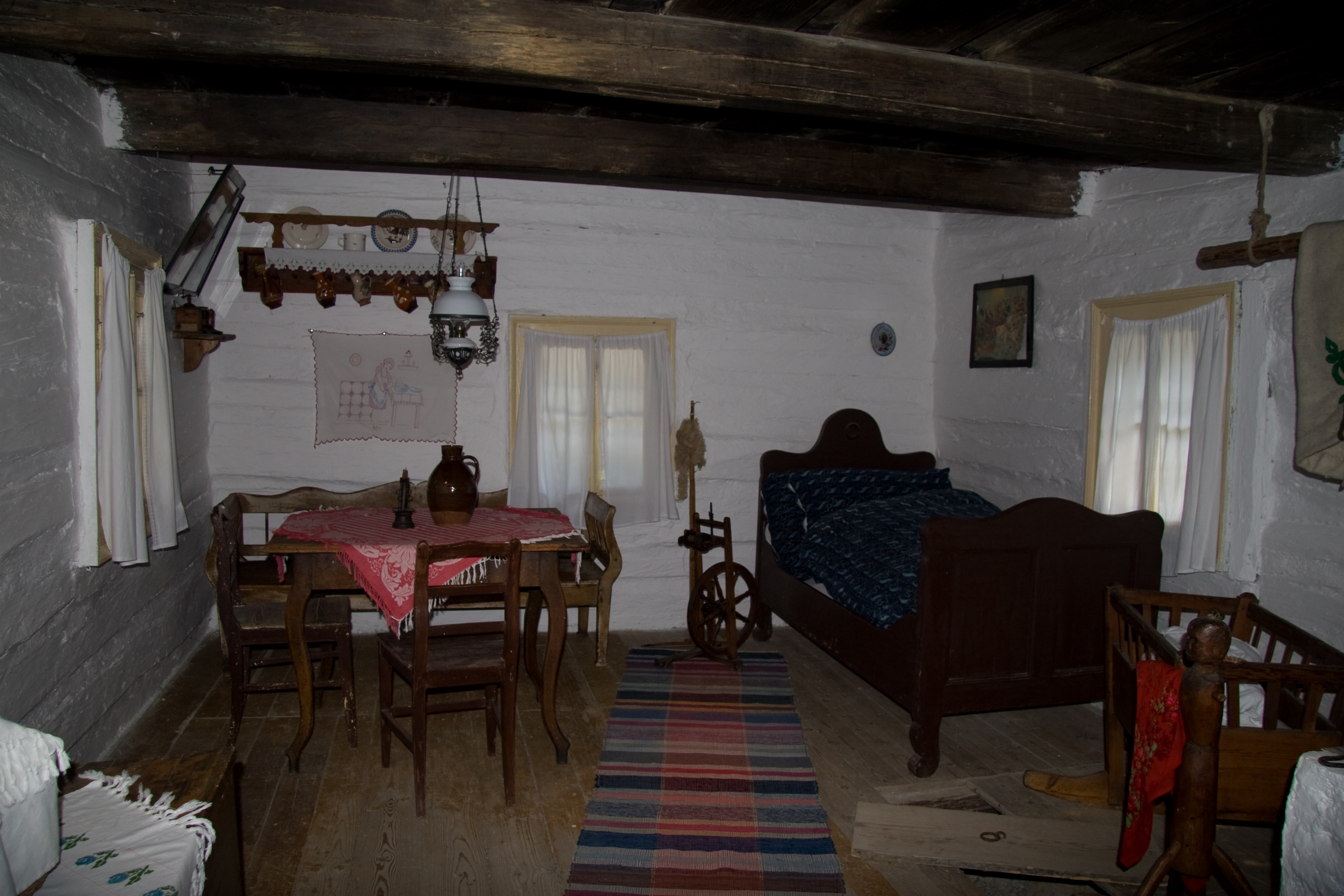 Vlkolínec.